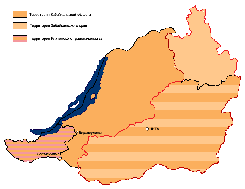 Карта территории Забайкальской области Российской империи и Забайкальского края РФ